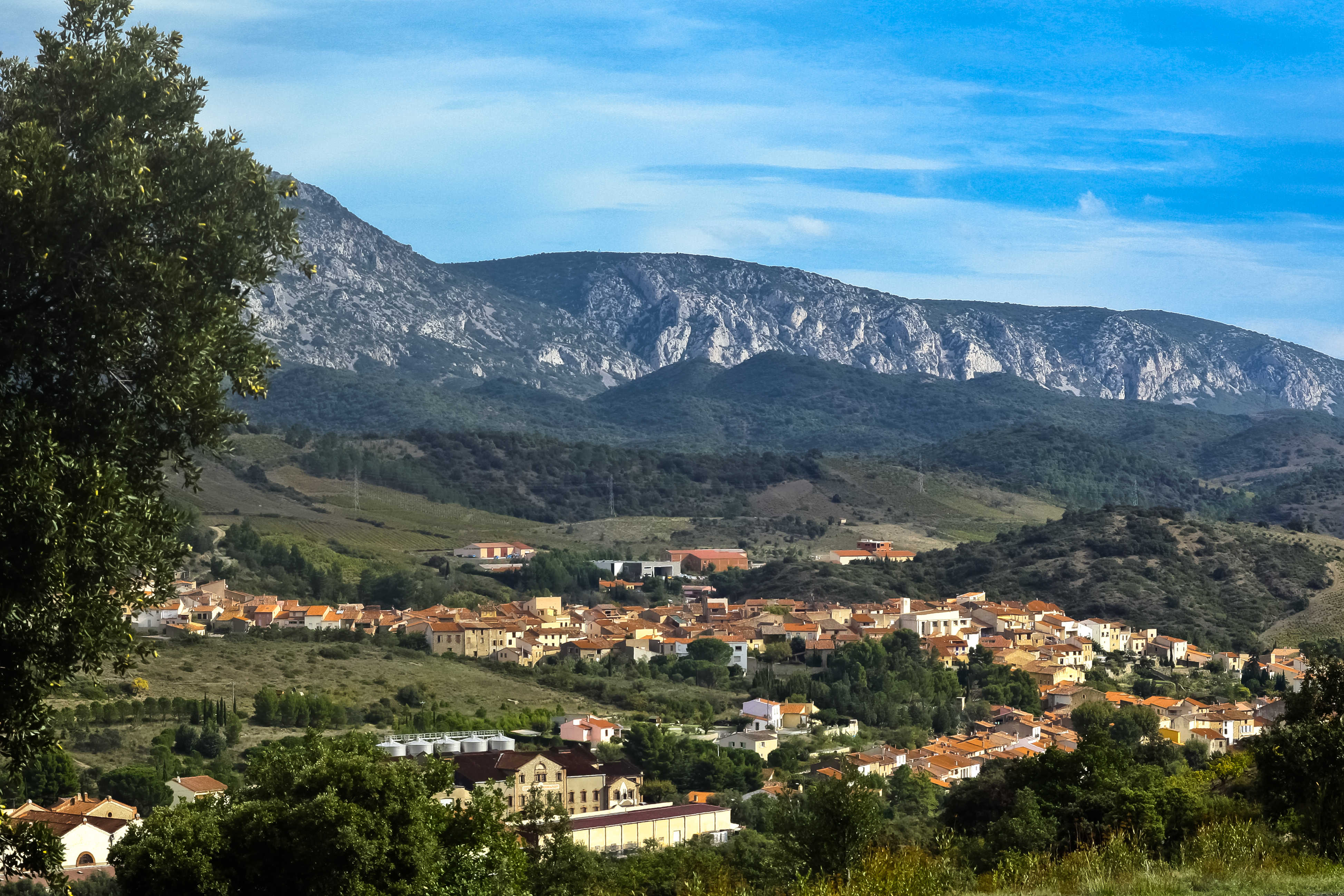 Le village de Maury, Pyrénées-Orientales, vue sud